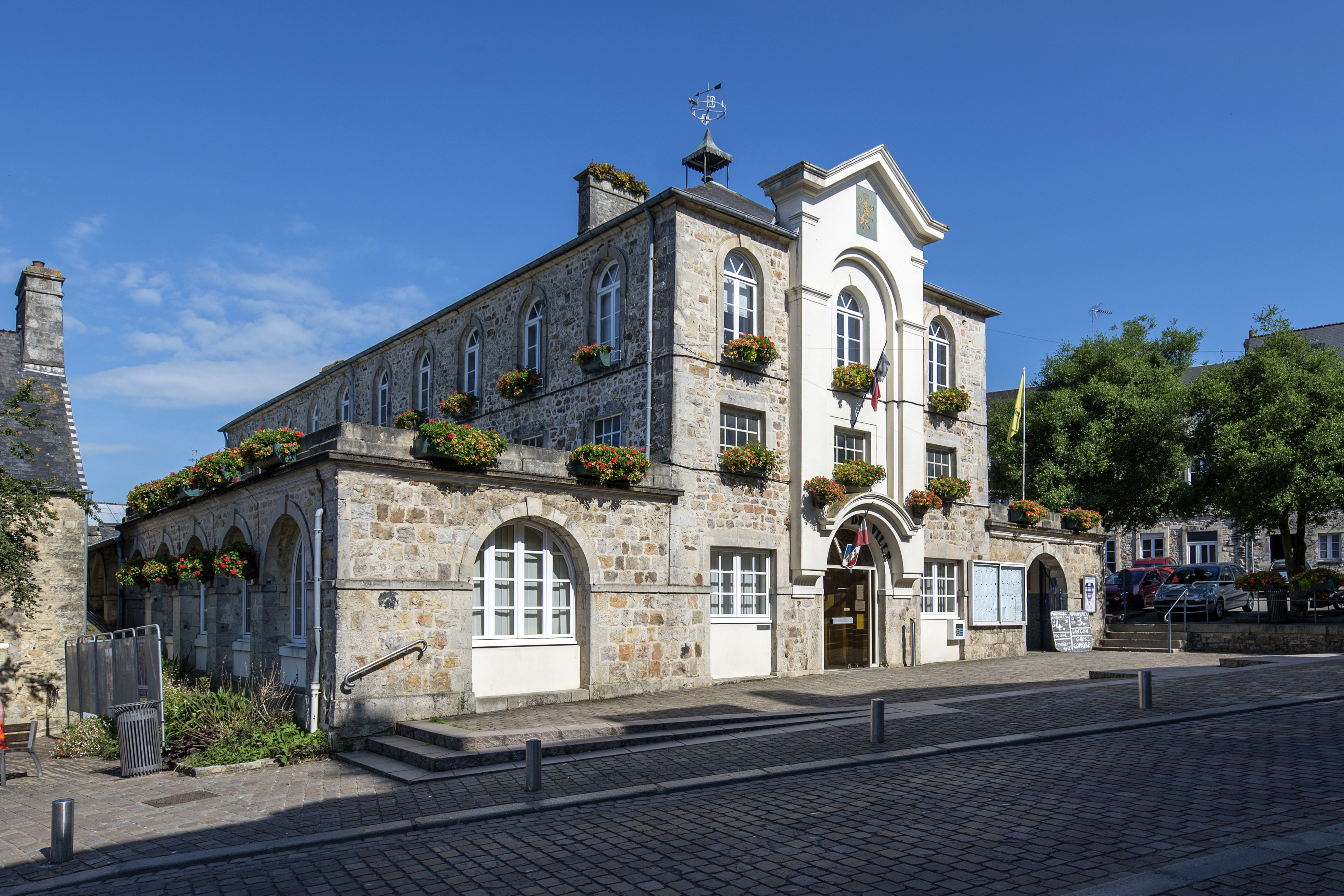 Hôtel de ville de Bricquebec, Manche, 2017.